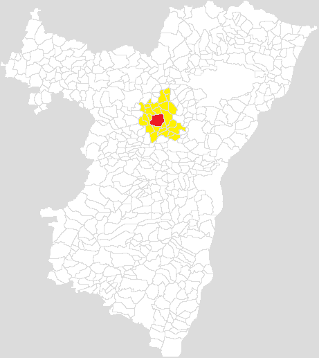 Communauté de communes du Pays de la Zorn